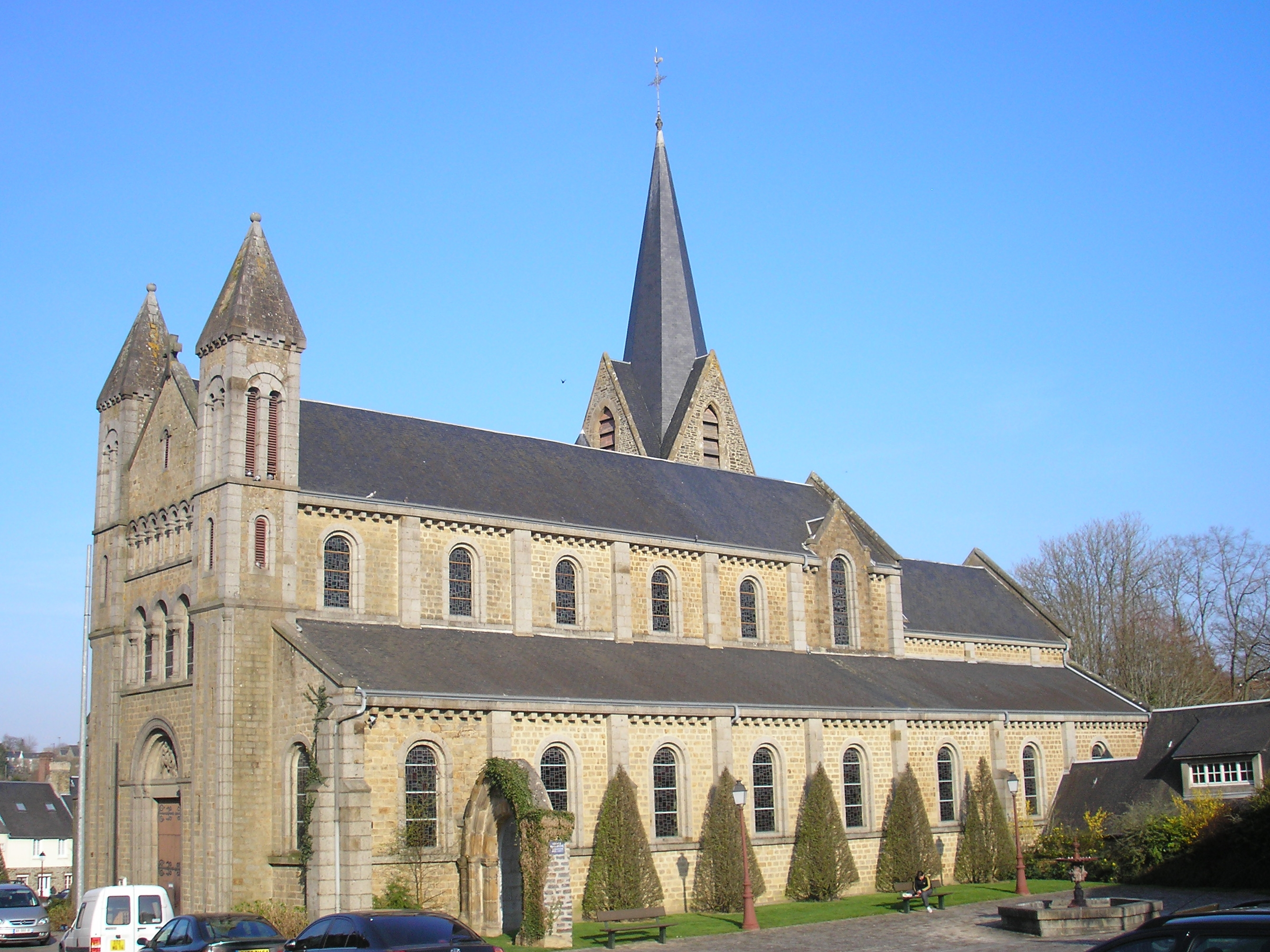 Condé-sur-Noireau (Normandie, France). L'église Saint-Martin.